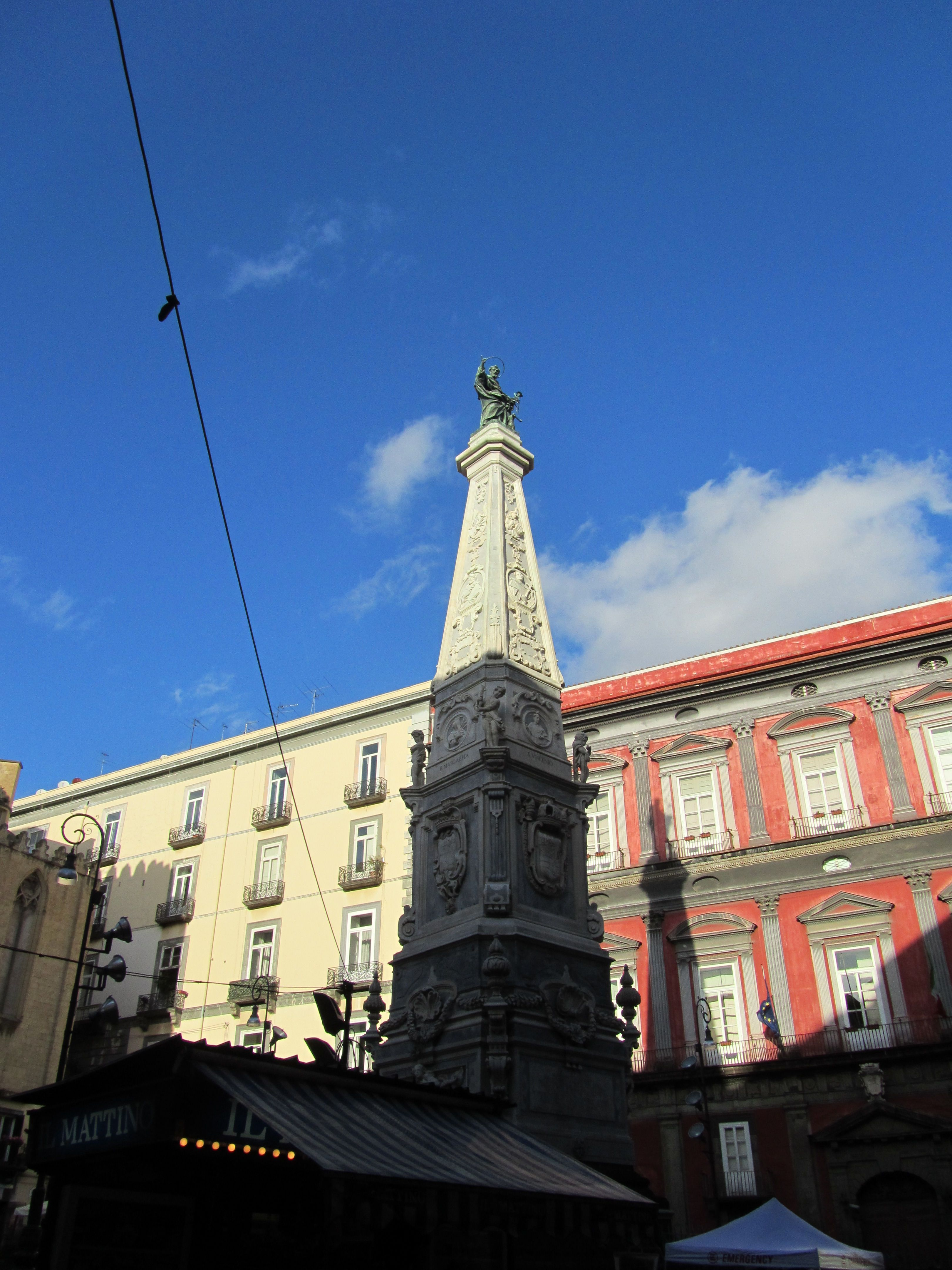 Obelisco di san Domenico Maggiore (Napoli)